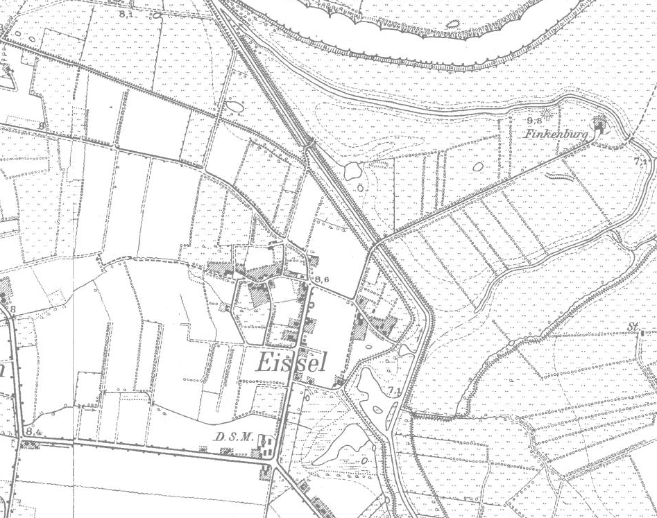 Karte Eißel 1899